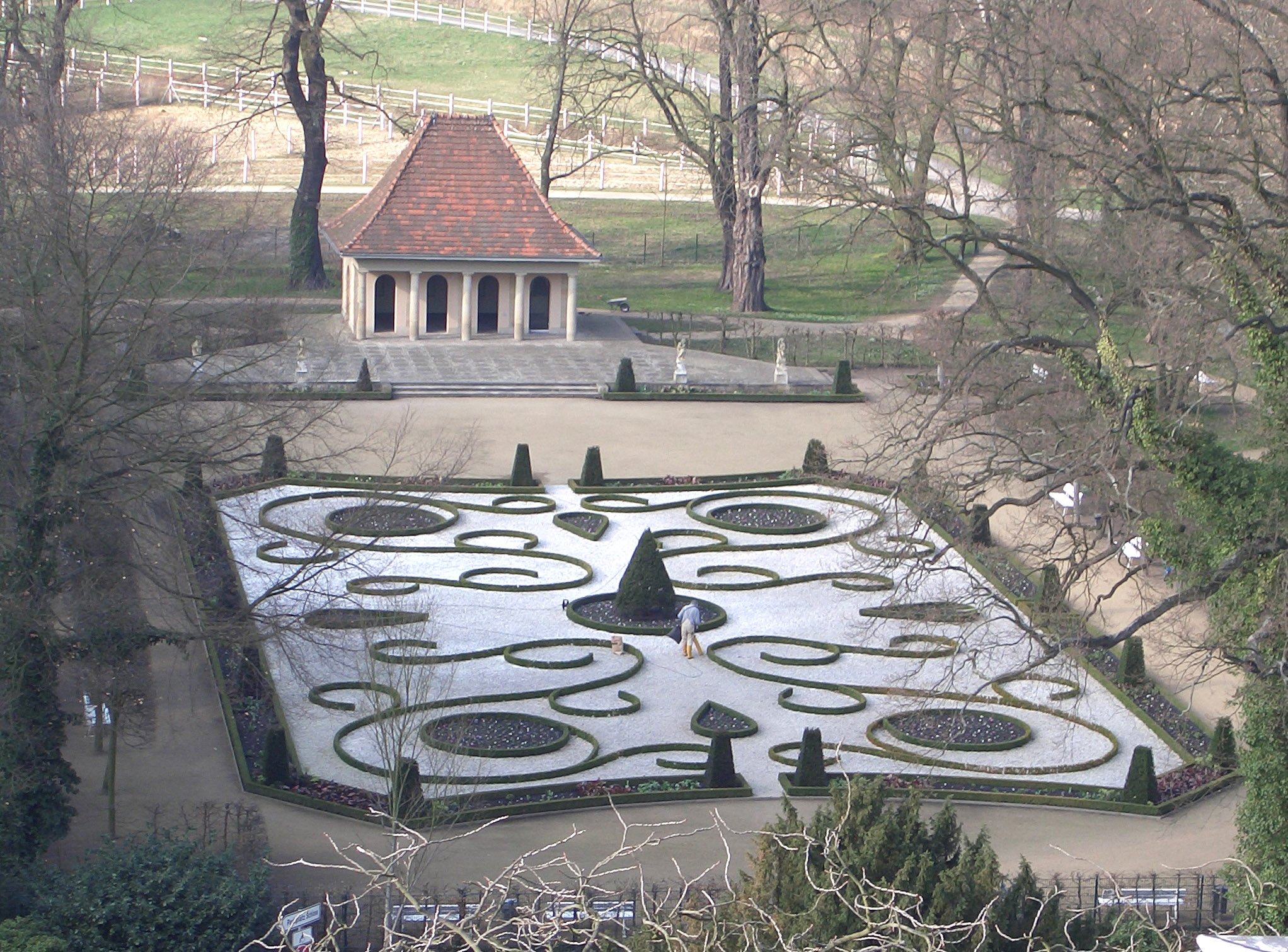 Schloss Wolfsburg, Park: Broderie—Parterre mit Teepavillon.